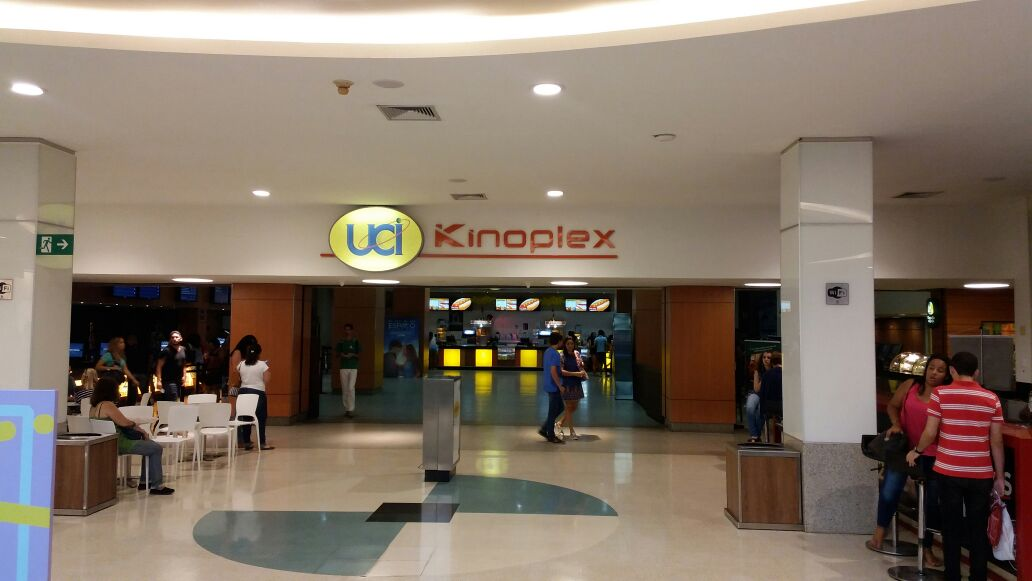 Entrada do Kinoplex Shopping Recife